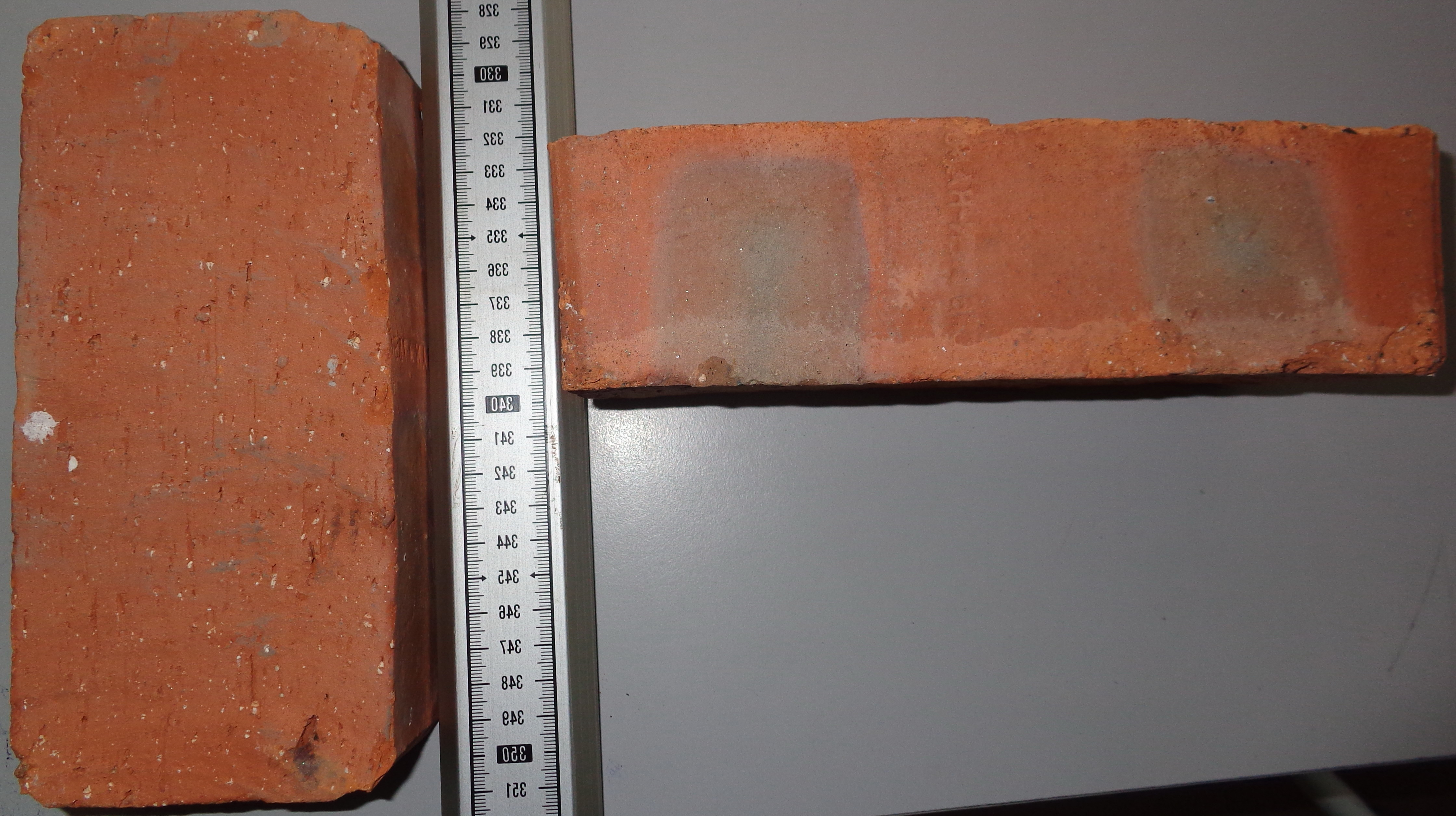 Kích thước đứng của viên gạch chỉ đặc (chiều dài và chiều dầy).